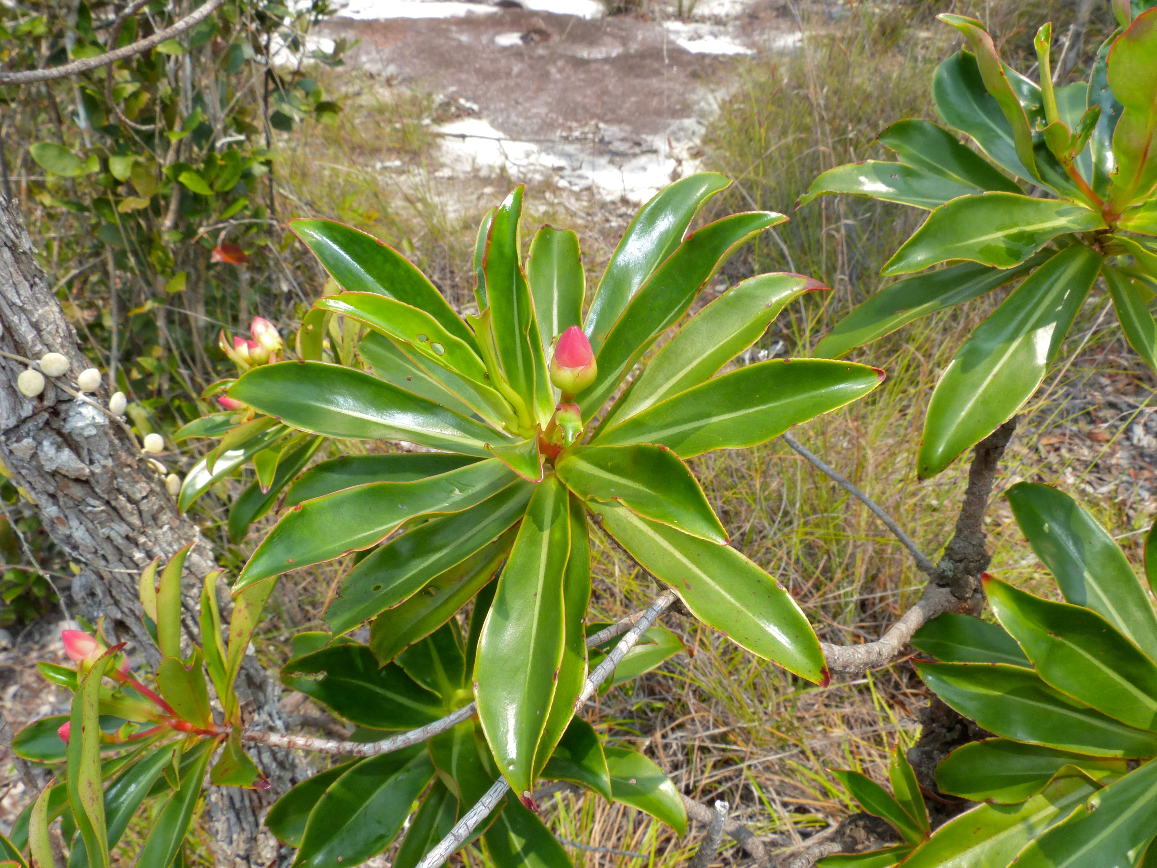 Lintang Trail, Bako NP, Sarawak, MALAYSIA